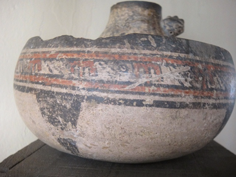 Ceramica policromatica, en museo de stio Huellas de Acahualinca